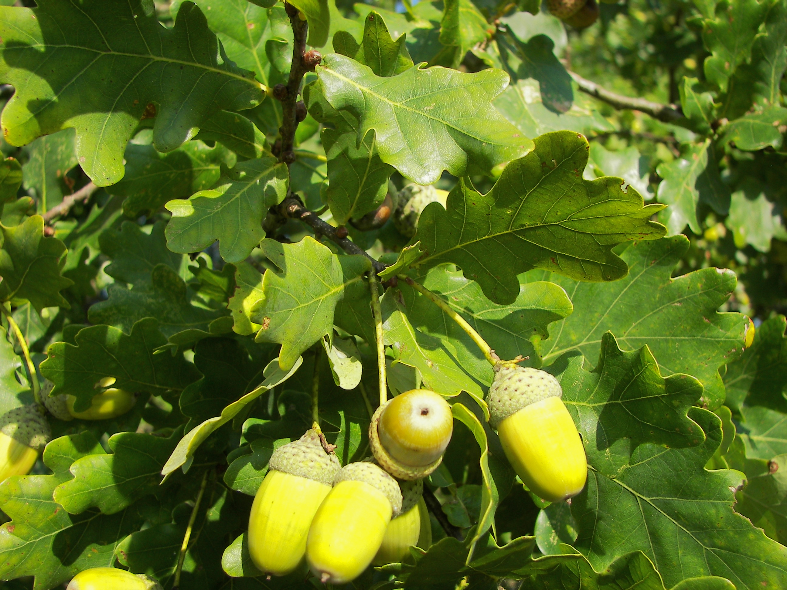 Laub und Eicheln einer Stieleiche (Quercus robur) in der Lüneburger Heide bei Niederhaverbeck